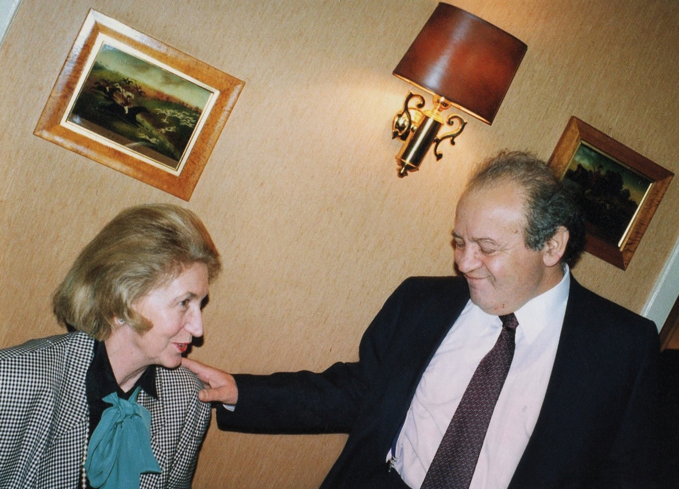 Gabriel Laub, Schriftsteller und Satiriker in Hamburg mit Rosmarie Fiedler-Winter von der Hamburger Autorenvereinigung